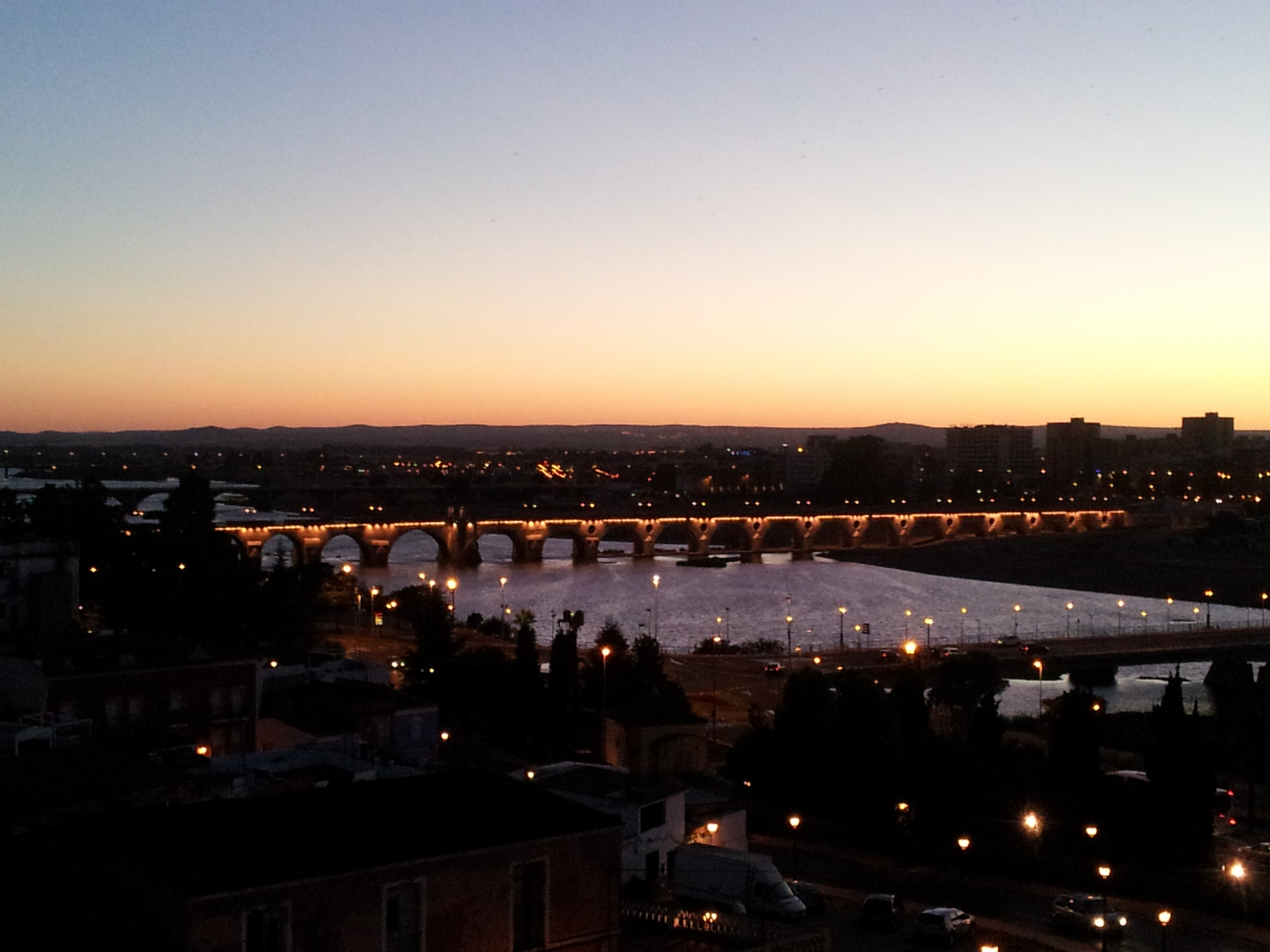 Puente Romano sobre el Guadiana en Badajoz visto desde la Alcazaba